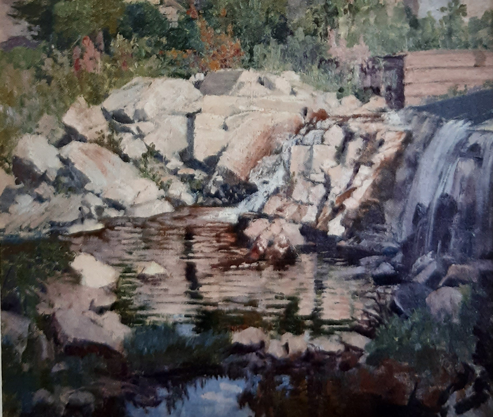 Bewegtes Wasser, 1902, Öl auf Leinwand, 38 x 44 cm